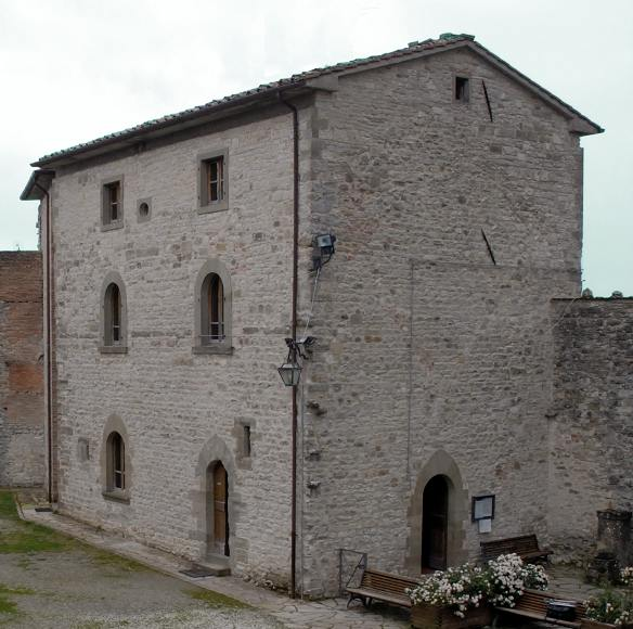 Caprese Michelangelo, Palazzo Clusini. Biblioteca Michelangiolesca, Museo Michelangiolesco